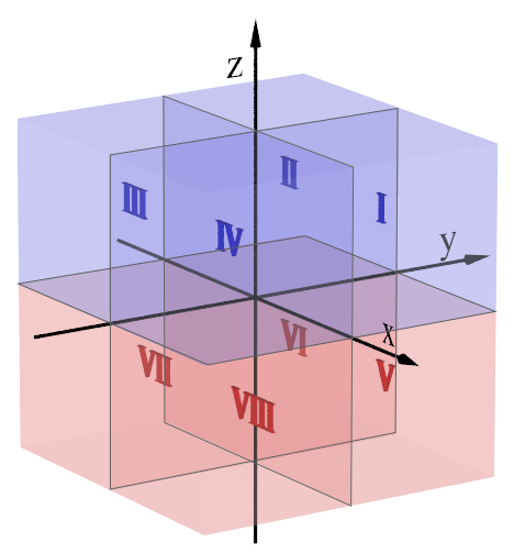 oktanter